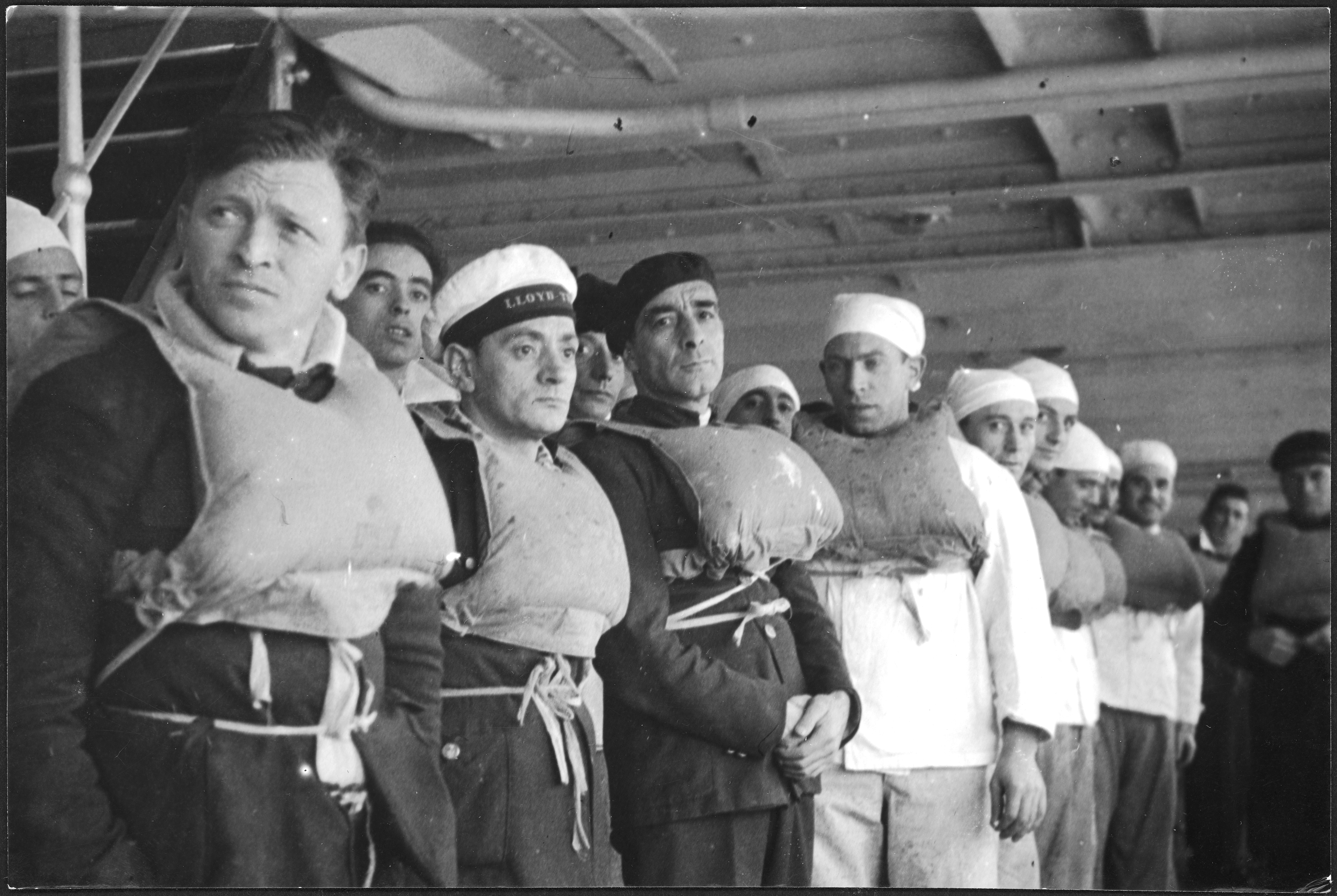 Mittelmeer, 75 km SW von Toulon: Brand der Orazio; Matrosen mit Schwimmwesten an Deck